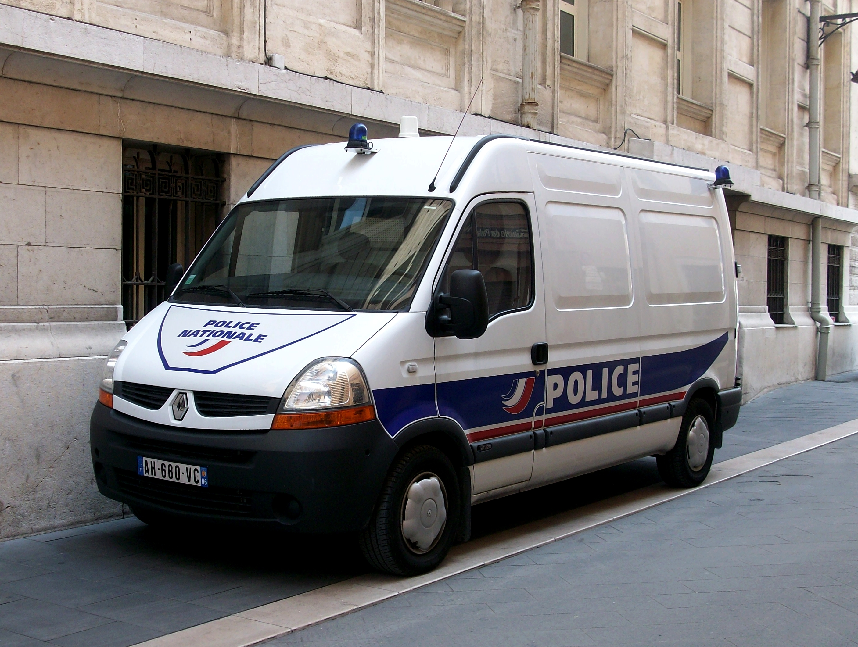 Fourgon Renault Master de la police nationale stationné le long du palais de justice de Nice